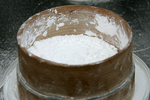 Konditorei Buchmann: Puderzucker für die Berliner